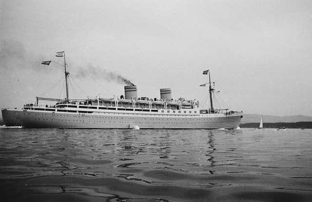 MS Oslofjord bygget ved Deutsche Schiff- und Maschinenbau AG, Bremen, for Den Norske Amerikalinje AS. Gikk på en mine 1. desember 1940 ved munningen av Tyne. I dag ligger restene av vraket av Oslofjord syd av South Shields utenfor Newcastle og er et yndet sted for sportsdykkere.